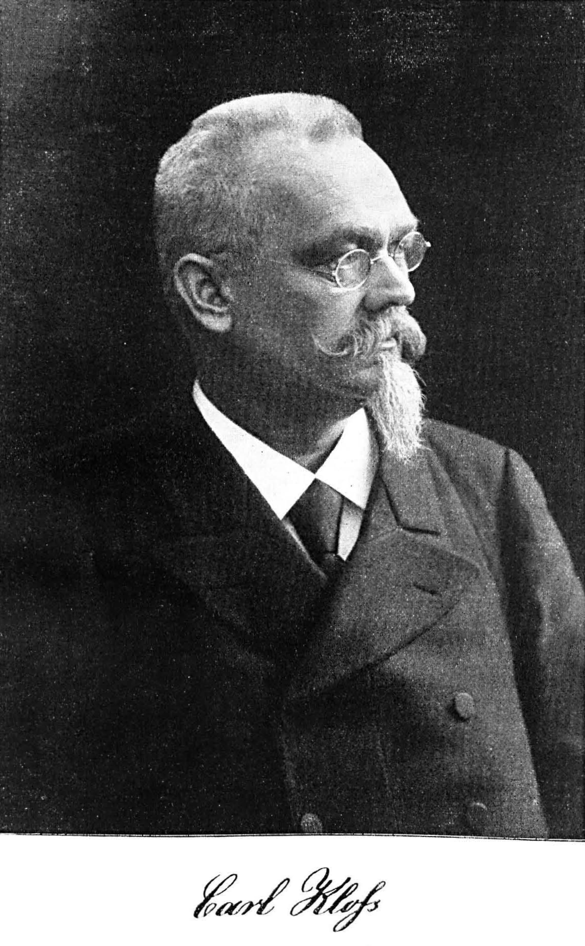 Karl Kloß, Porträt.